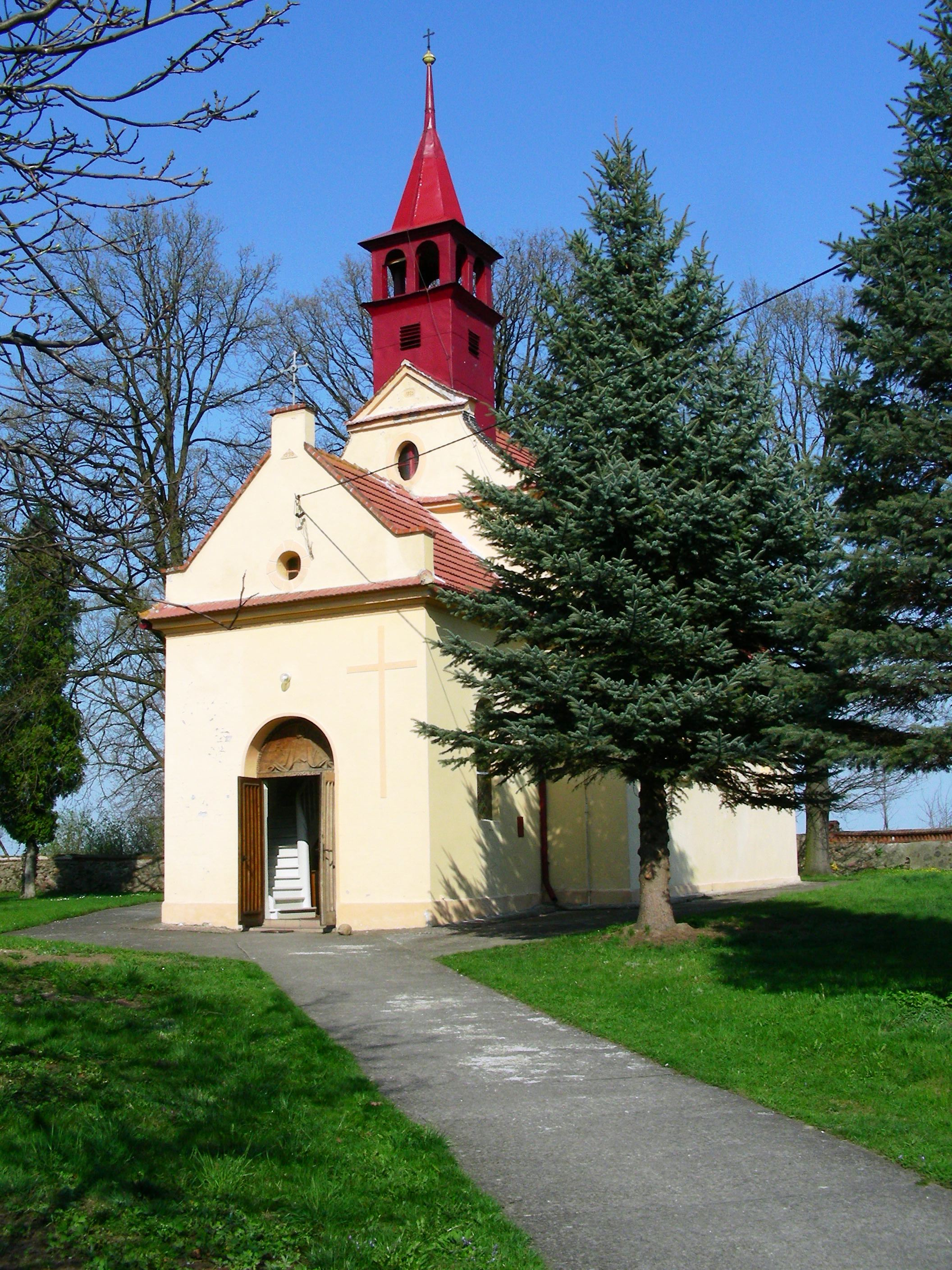 Kościół Matki Bożej Częstochowskiej w Przydrożu Wielkim, Przydroże Wielkie, gmina Korfantów, powiat nyski, województwo opolskie.